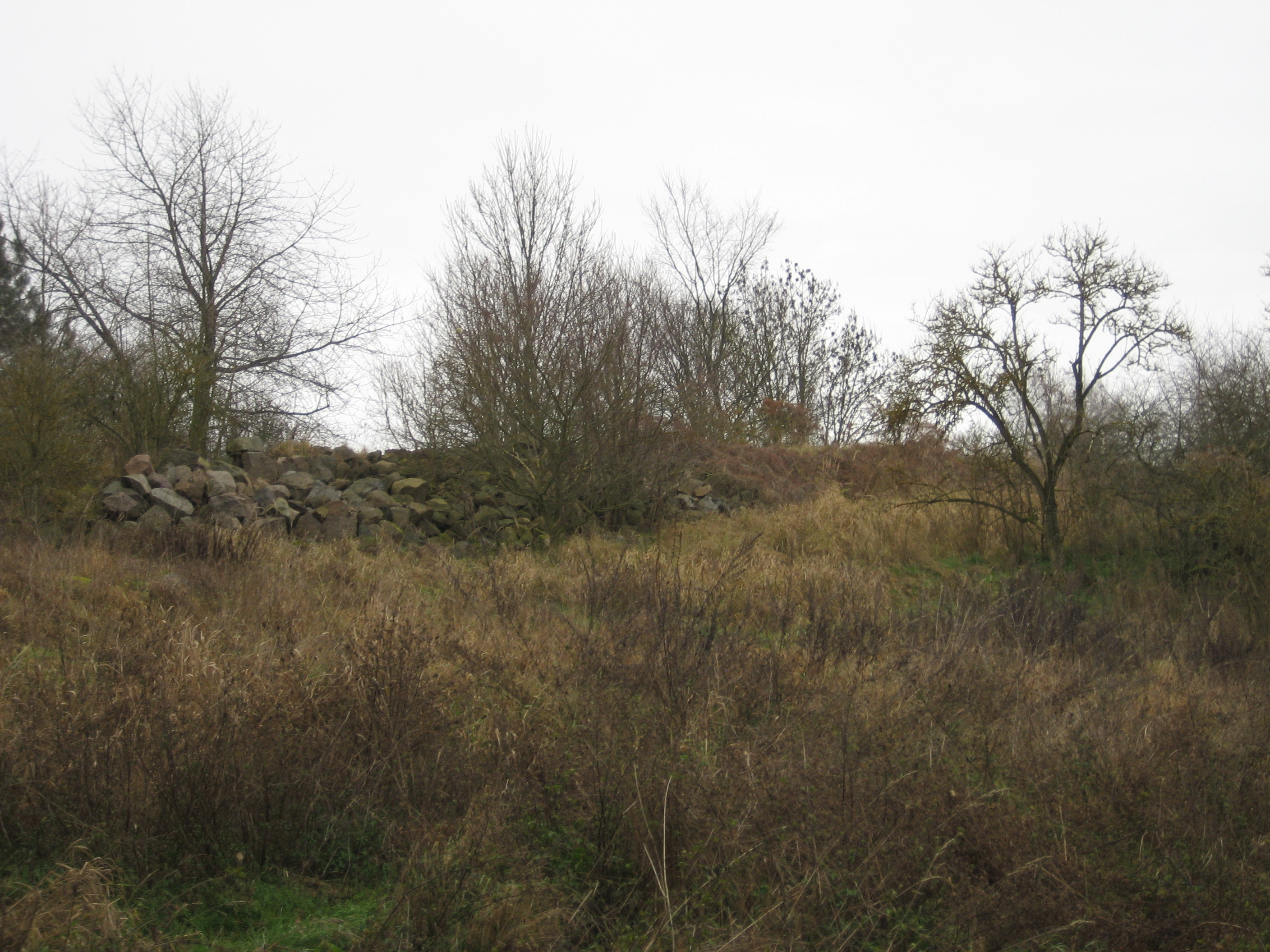 Steine und Schuttreste des Johanneshofes auf dem Johannesberg in der Nähe des Löcknitzer Sees an der Landstraße von Löcknitz nach Retzin.